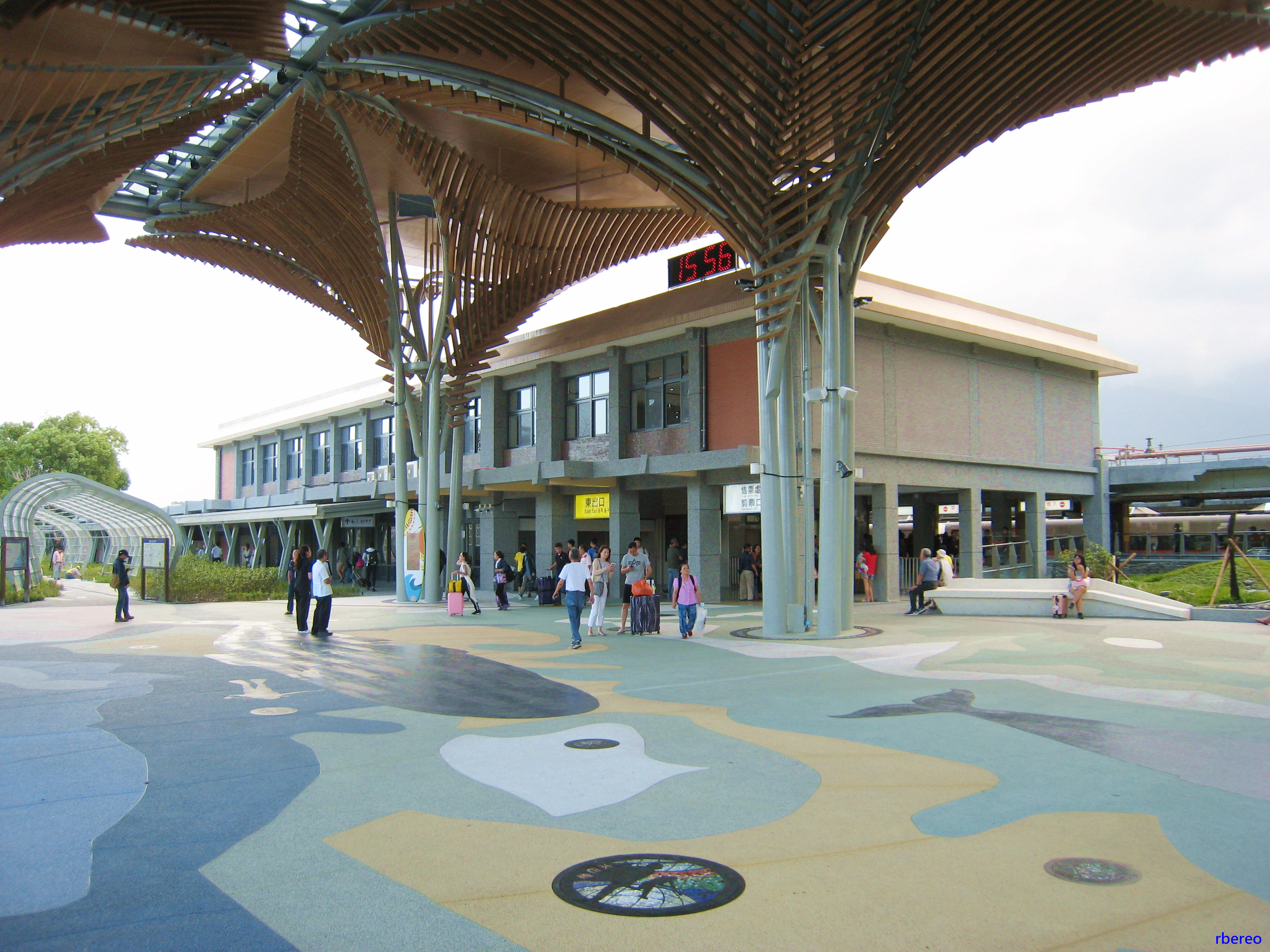 108年10月花蓮車站東站出口